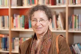 Foto van op de website van het Korzybski instituut.